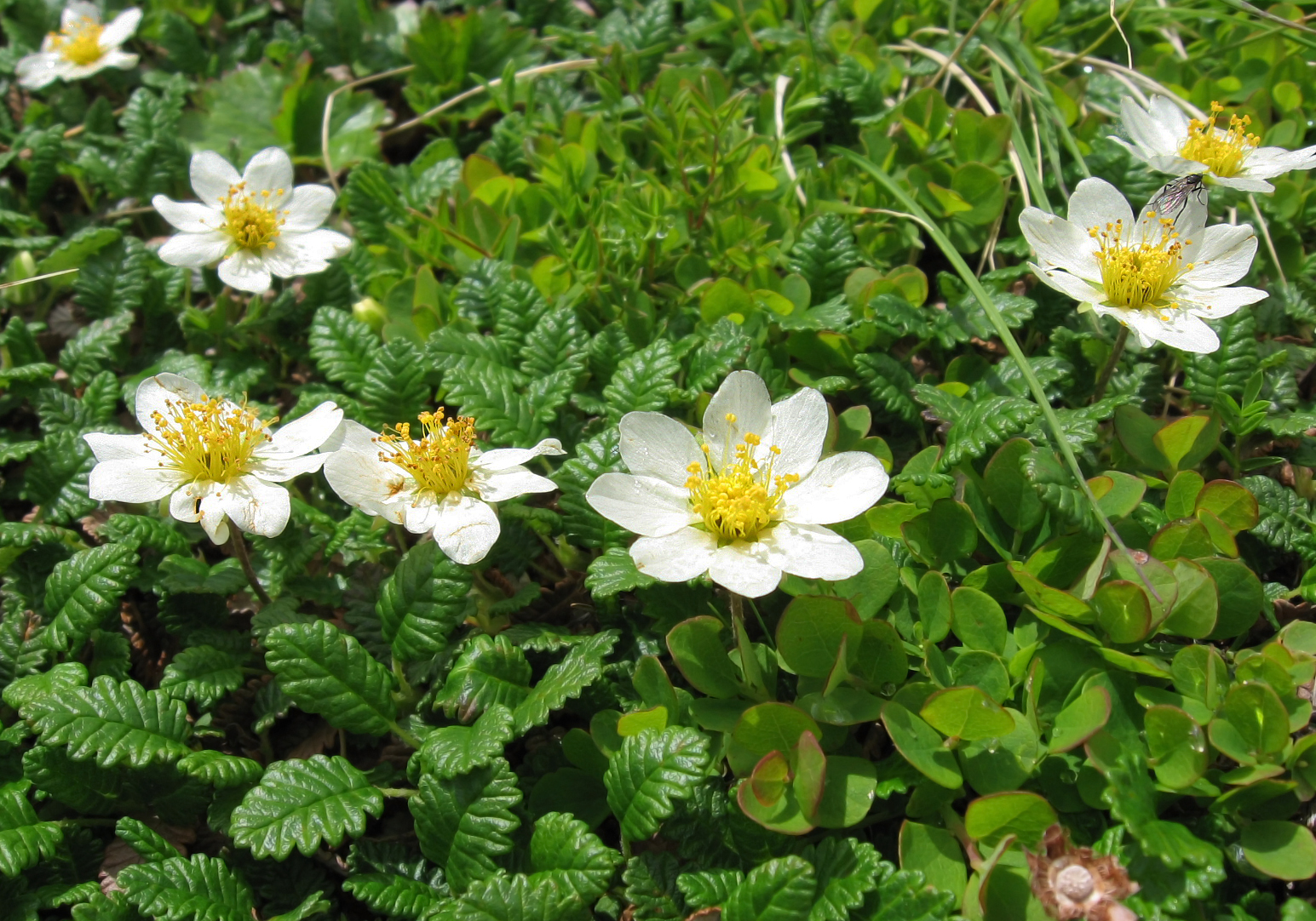 チョウノスケソウ (学名:Dryas octopetala var. asiatica)